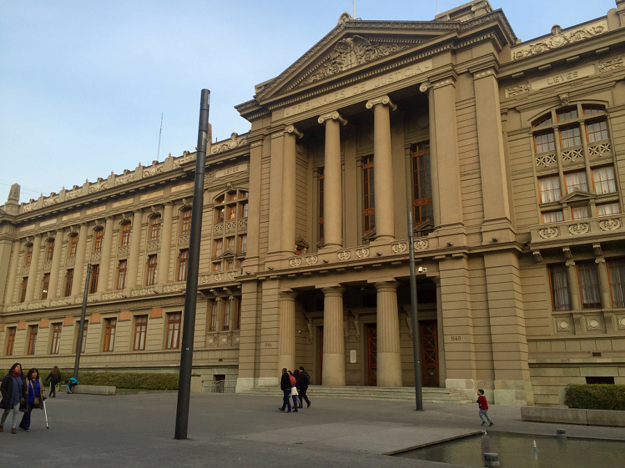 Дворец юстиции в Сантьяго